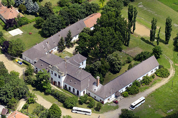 Gosztonyi-kastély, Boconád